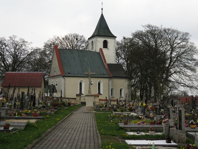 Kostel svatého Jakuba Většího, Křeč, Křeč (okres Pelhřimov).